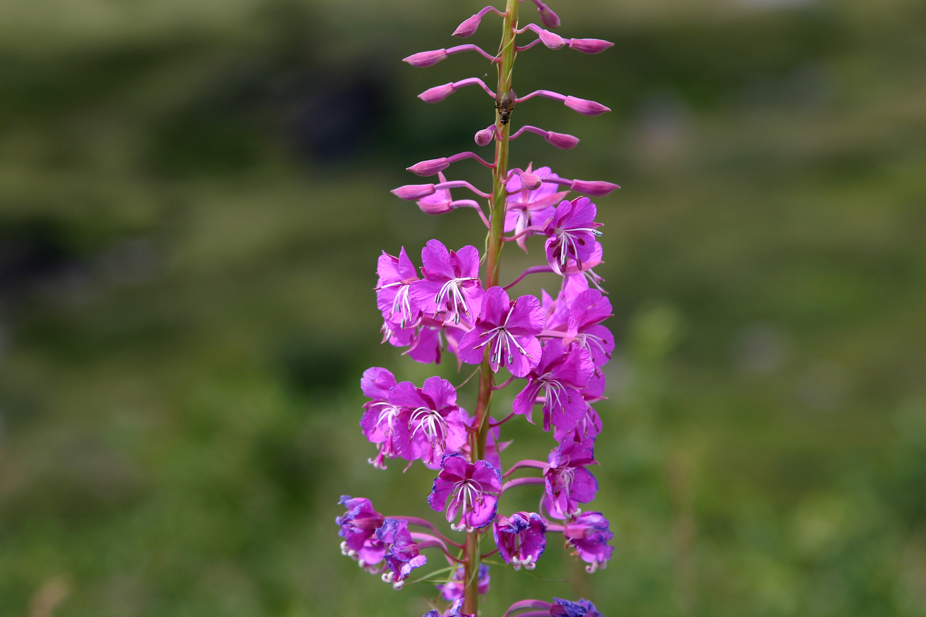 Epilobium angustifolium